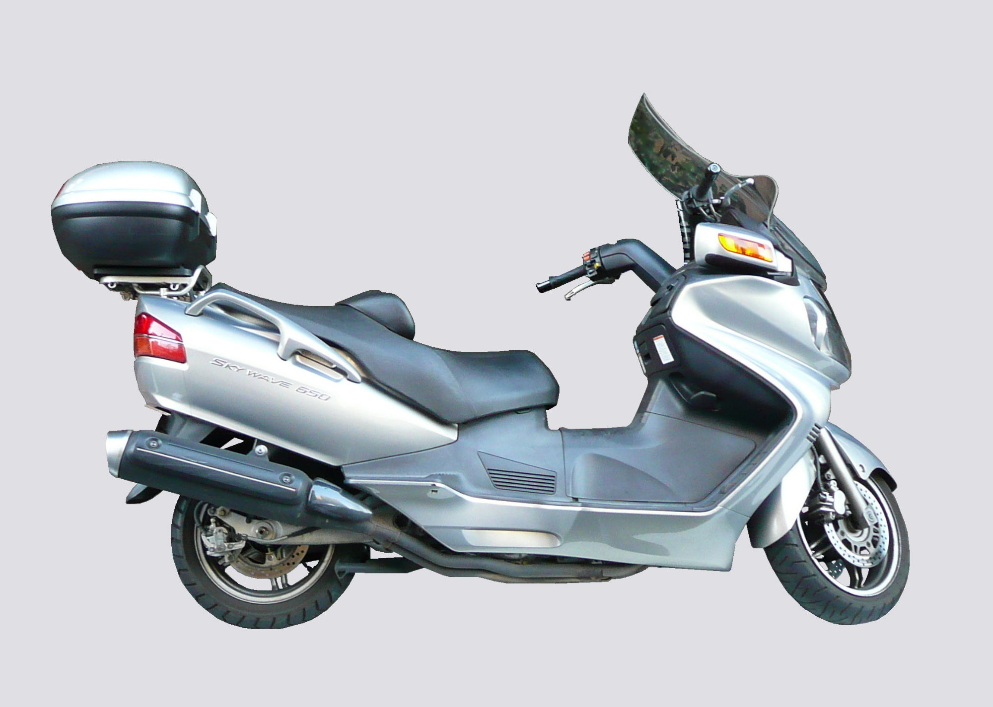 SUZUKI SKYWAVE 650